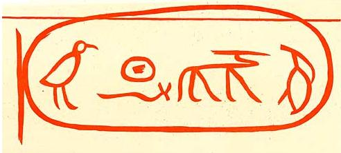 Kartuše paovníka Chufua; graffito pracovní čety na bloku z Velké pyramidy